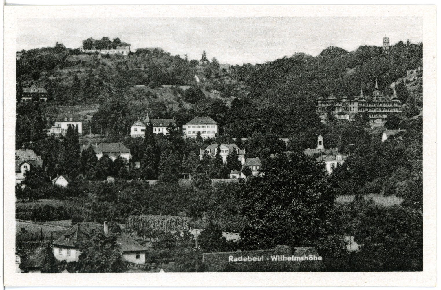 Radebeul; Wilhelmshöhe und Bilz-Sanatorium This postcard is from publisher Brück & Sohn in Meißen ( postcard has a unique number 27768 and is available in a higher resolution at the publisher. This images was uploaded in a cooperation project between Wikipedians and the publisher.